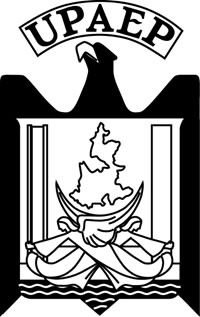 Escudo de la Universidad Popular Autónoma del Estado de Puebla.